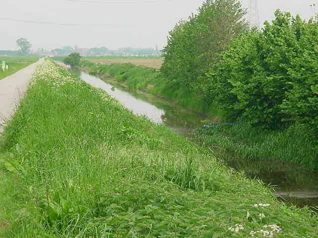 Lievekaneel - Eigen foto